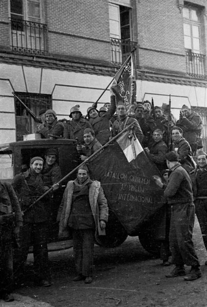 Tropas del 2º Batallón Garibaldi montadas en camiones rusos 3HC, en el patio de Zarco del Valle en El Pardo. Dispuestas a acudir al frente del Cerro de Los Ángeles y de la Ciudad Universitaria en Madrid. Comandante del Batallón: Randolfo Pacciardi. Comandante de la Brigada: Máté Zalka (General Lukács). Noviembre de 1.936.